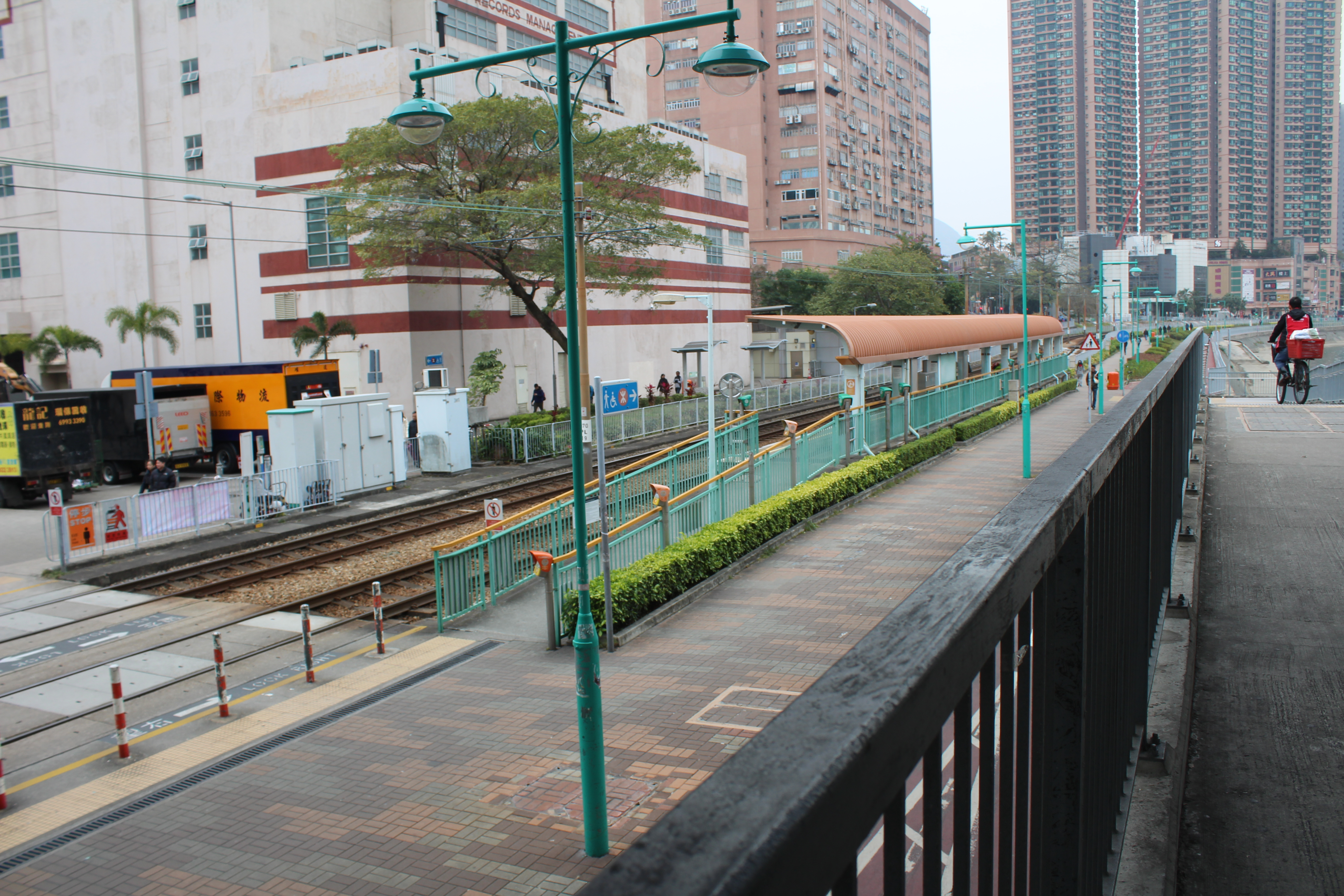 河田站2號月台外觀